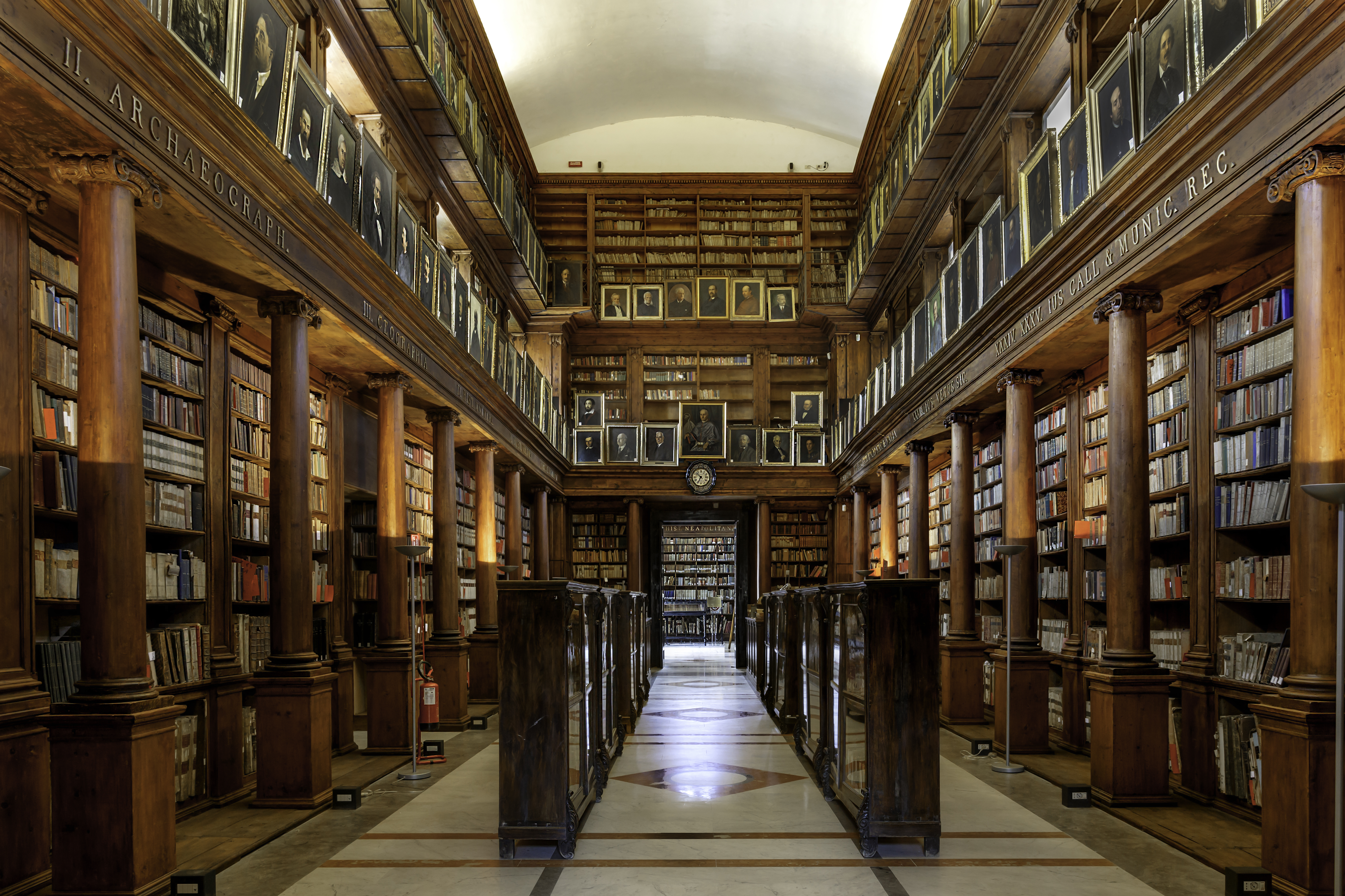 Biblioteca comunale This is a photo of a monument which is part of cultural heritage of Italy.